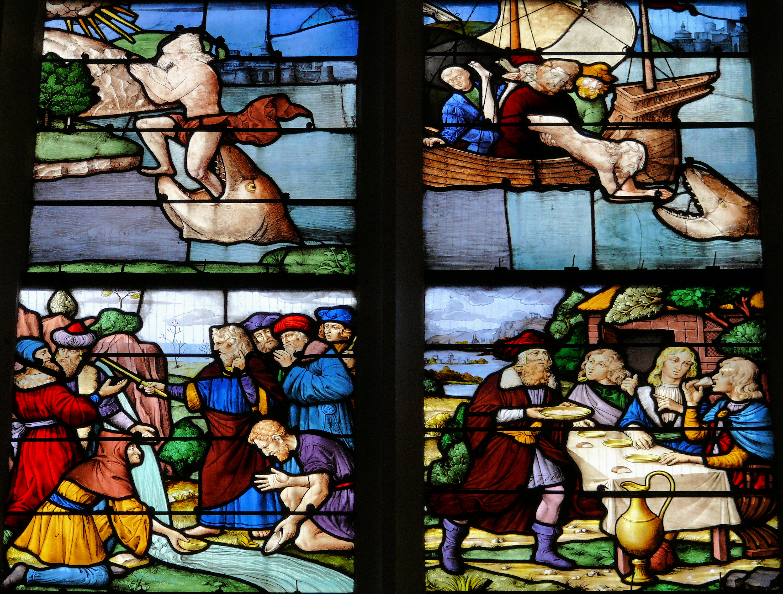 Vic-le-Comte - Sainte-Chapelle - Vitrail nord - Scène de l'Ancien Testament annonçant la Passion du Christ